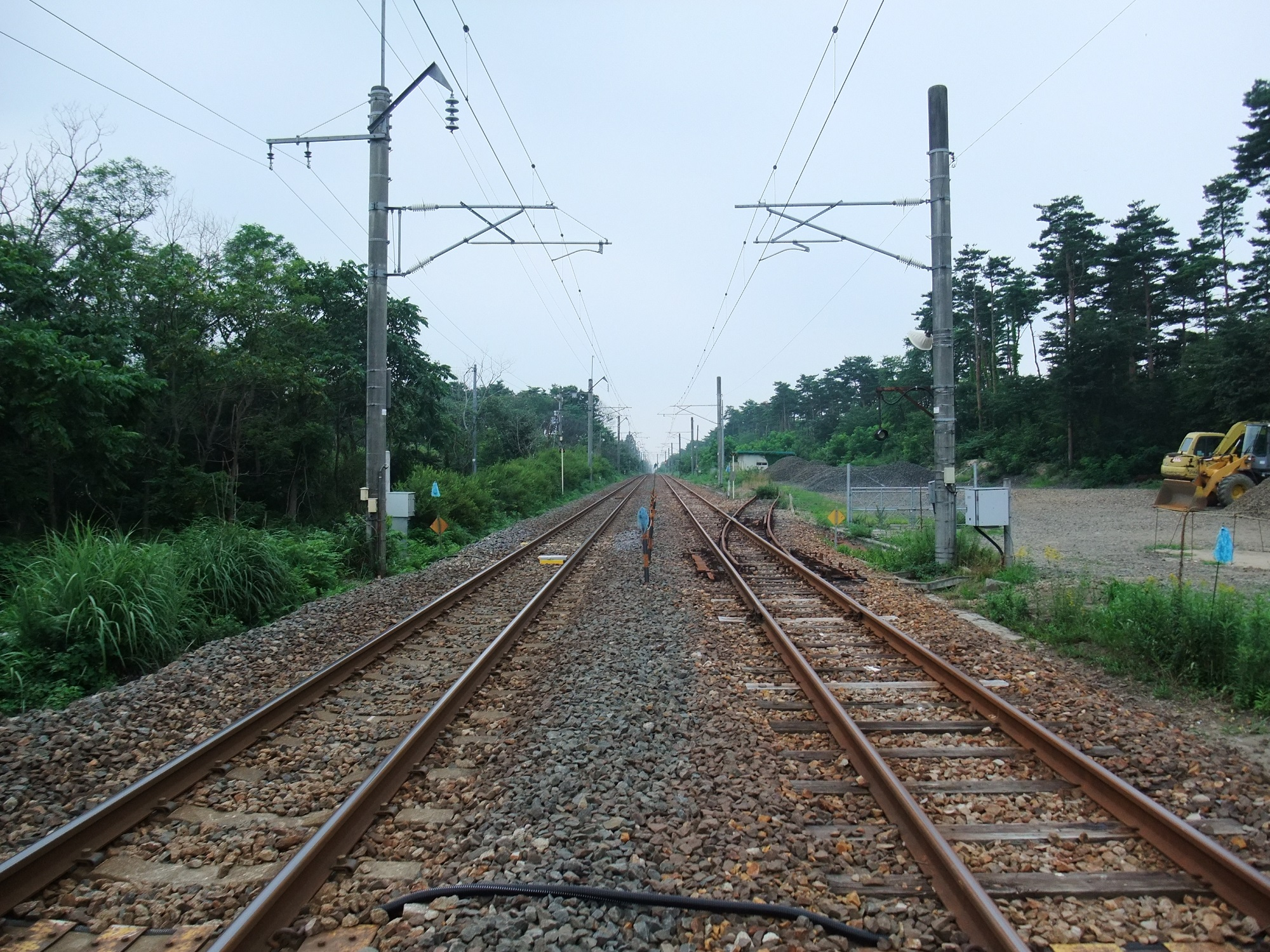 奥羽本線大清水信号場